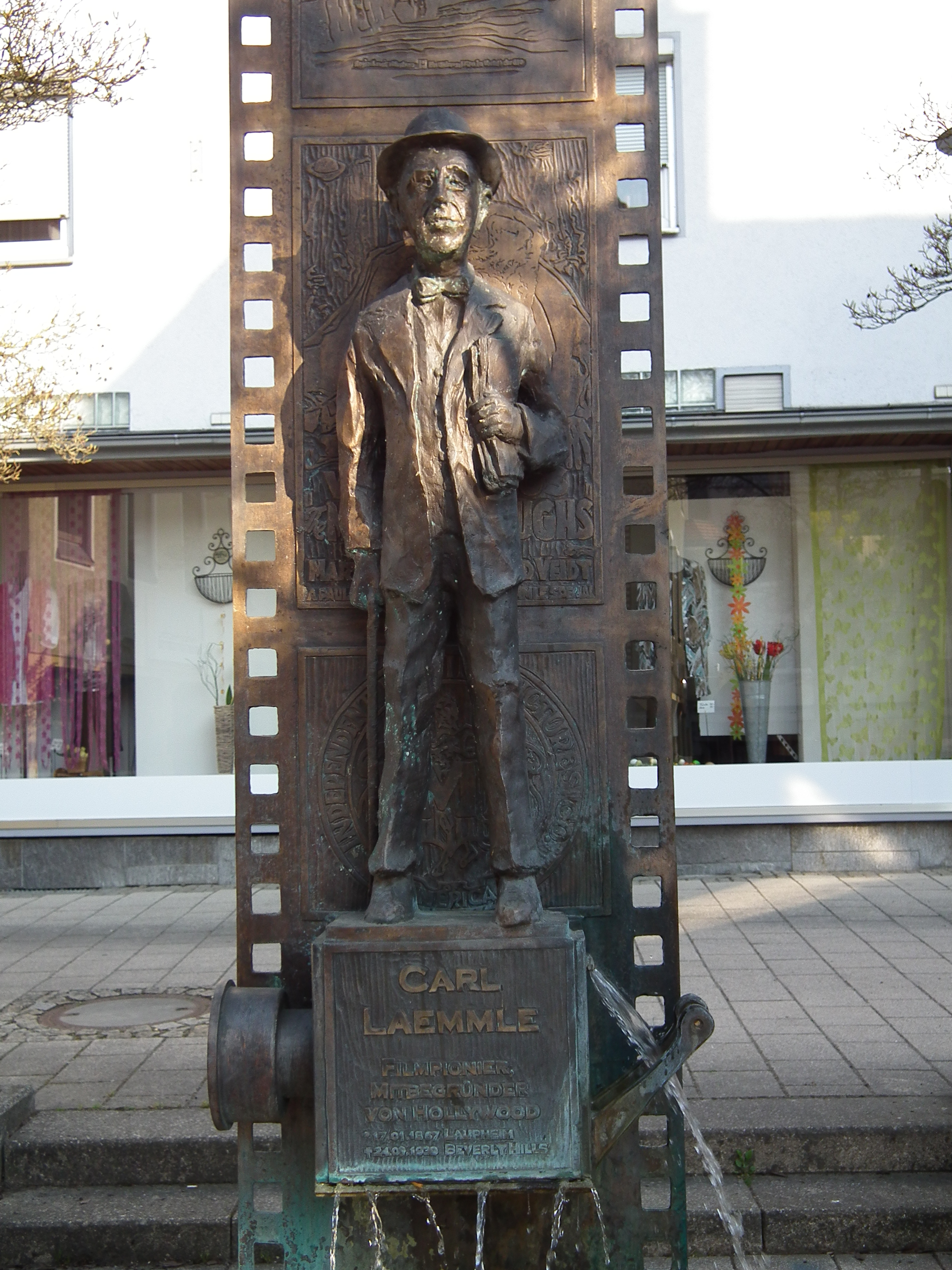 Denkmal für Carl Laemmle in Laupheim (Baden-Württemberg, Deutschland)